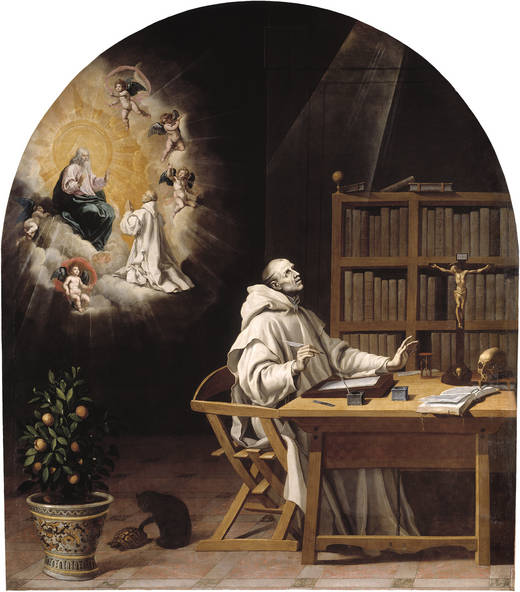 La visión de Dionisio Rickel, el Cartujano.label QS:Les,"La visión de Dionisio Rickel, el Cartujano."